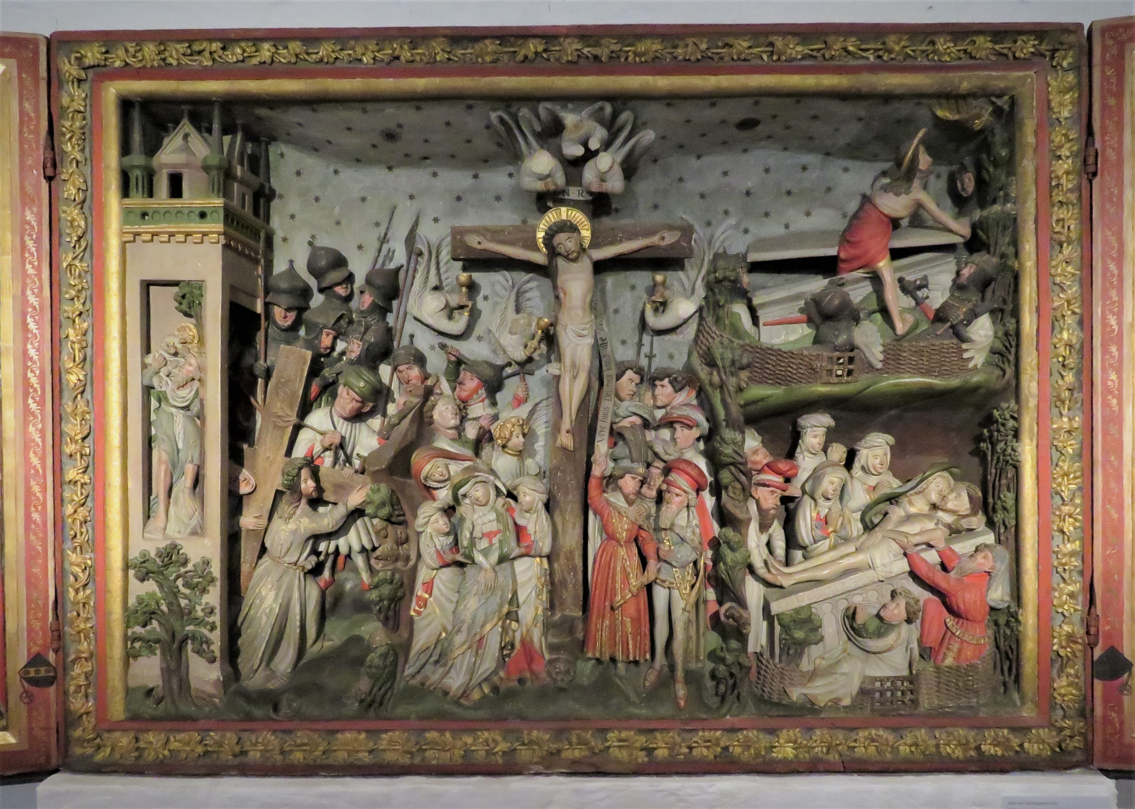 Flügelretabel der Zirkelgesellschaft ("Zirkelbrüderaltar'), Mittelteil (vor 1408), Baumberger Sandstein 127 x 176,5 cm